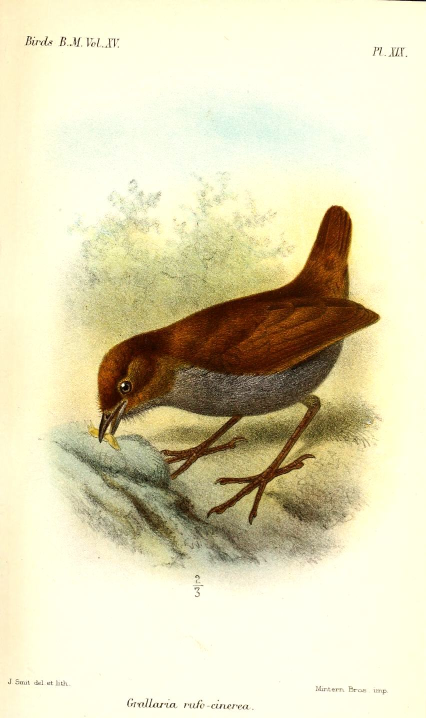 Grallaria rufo-cinerea = Grallaria rufocinerea, Bicolored Antpitta